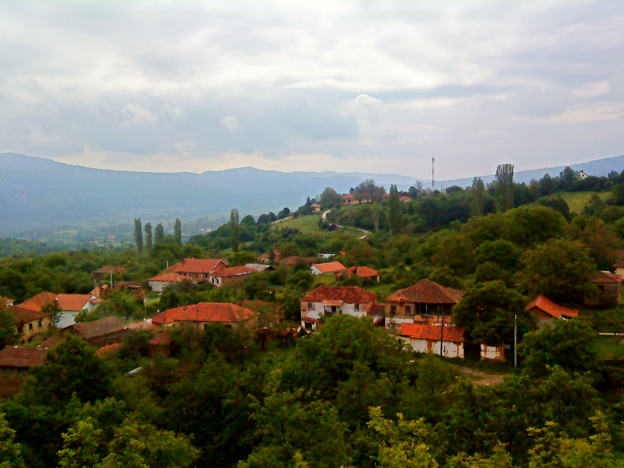 село Ѓавато